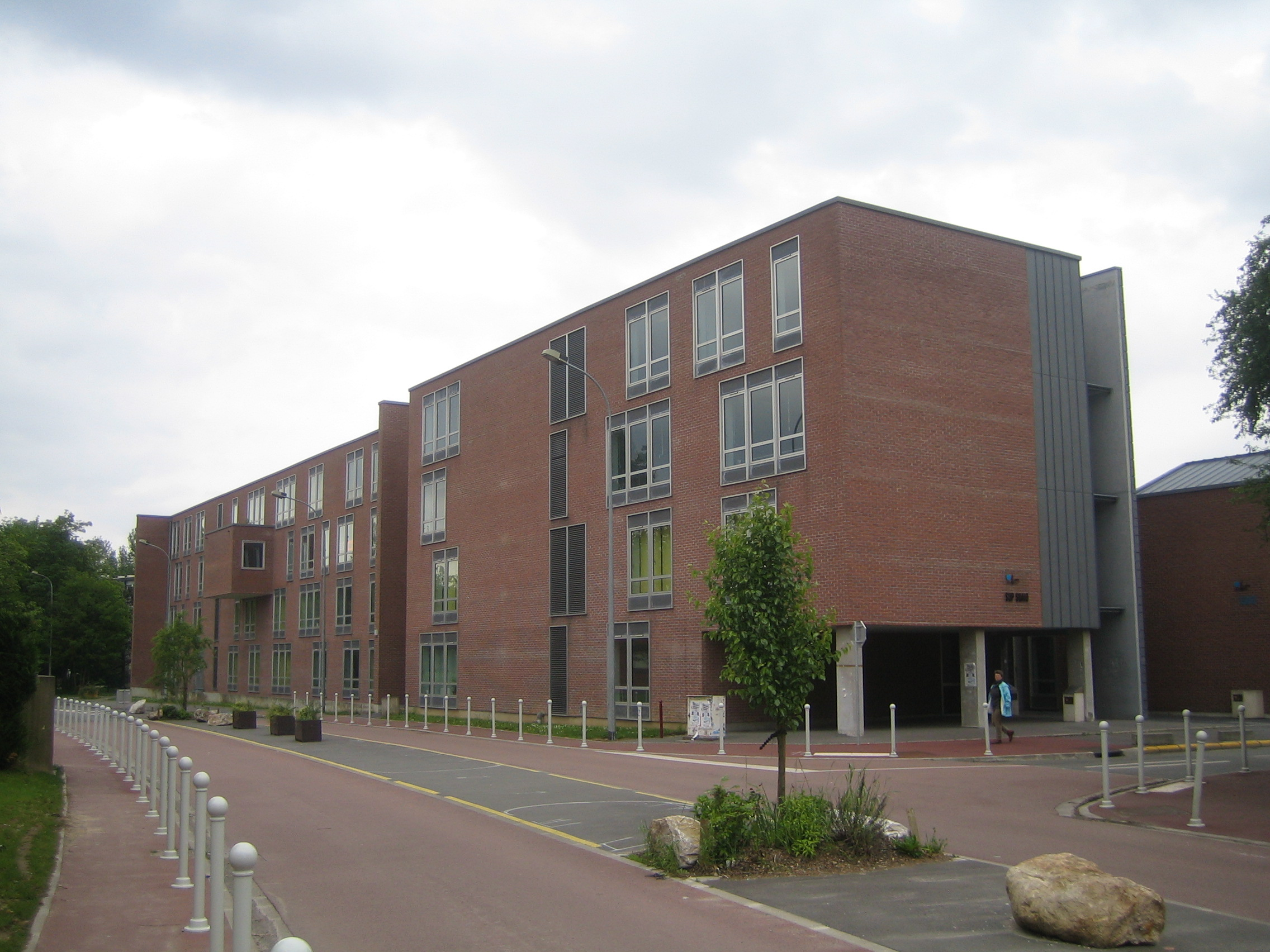 Bâtiment SUP-SUAIO de l'Université Lille I, Villeneuve d'Ascq